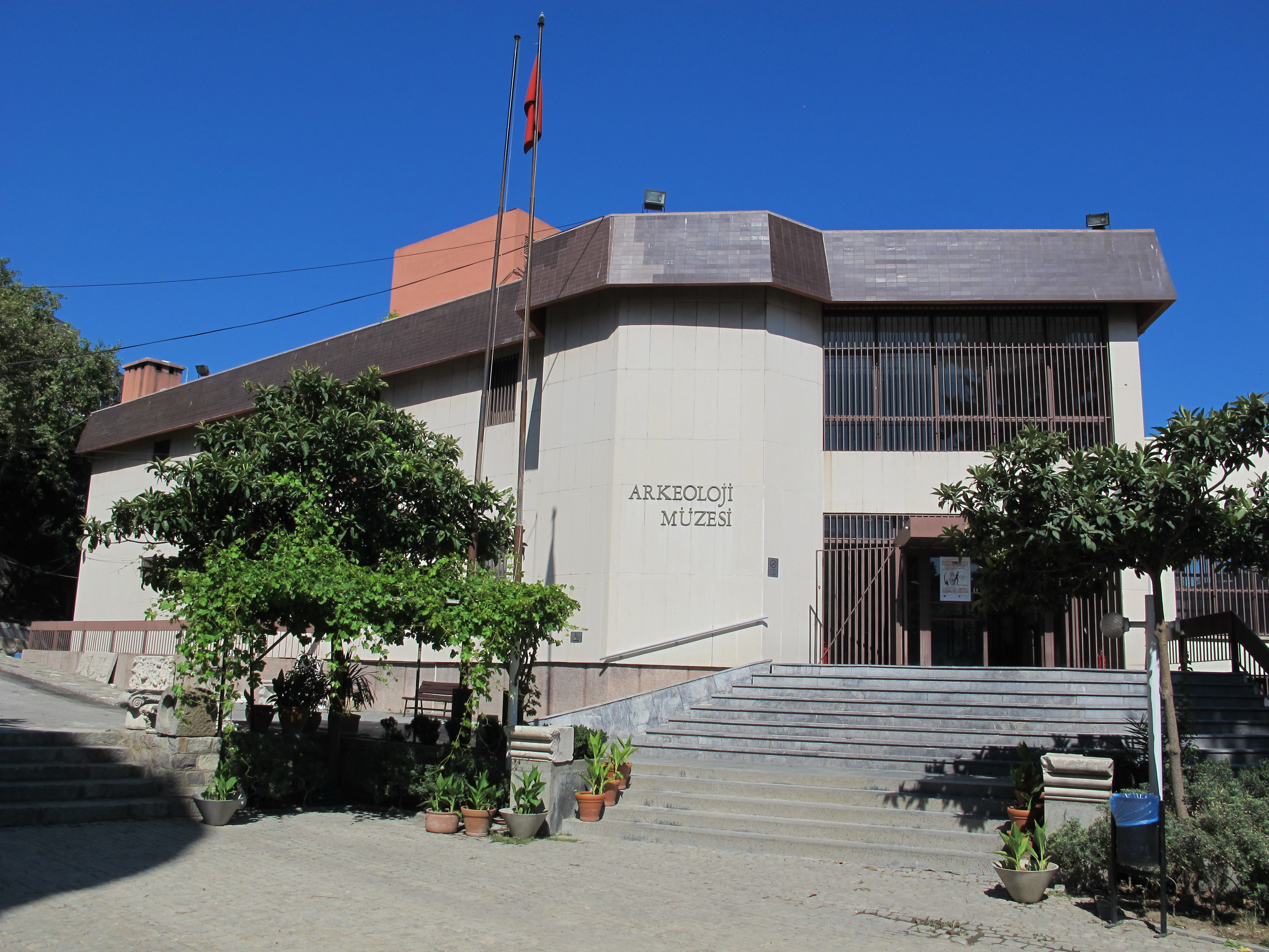 Museo archeologico di izmir, veduta